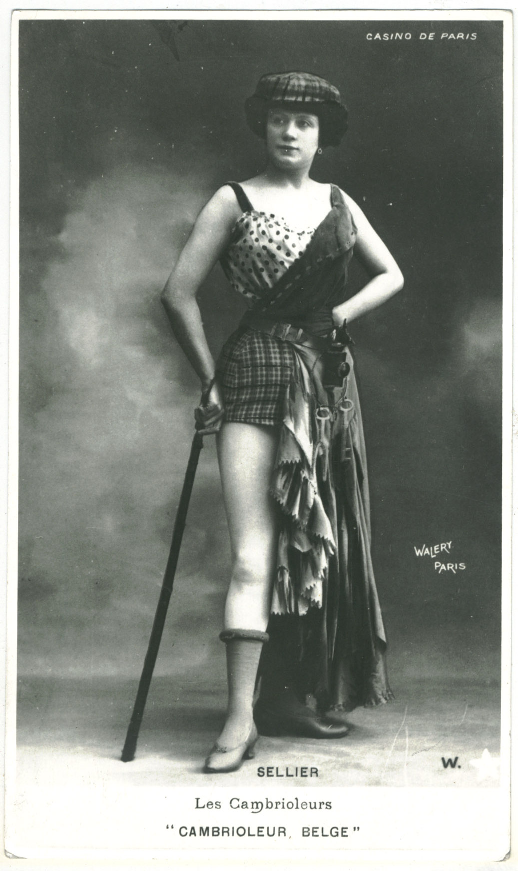 SELLIER. W. Étoile. Les Cambrioleurs, Cambrioleur Belge (Casino de Paris). Photo Walery